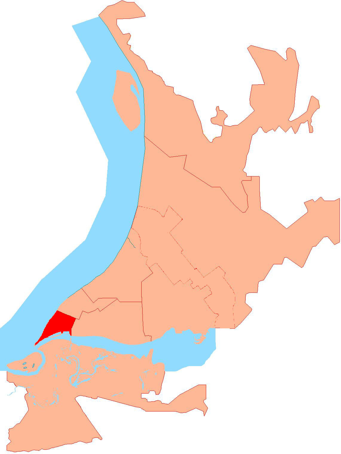 Samara district